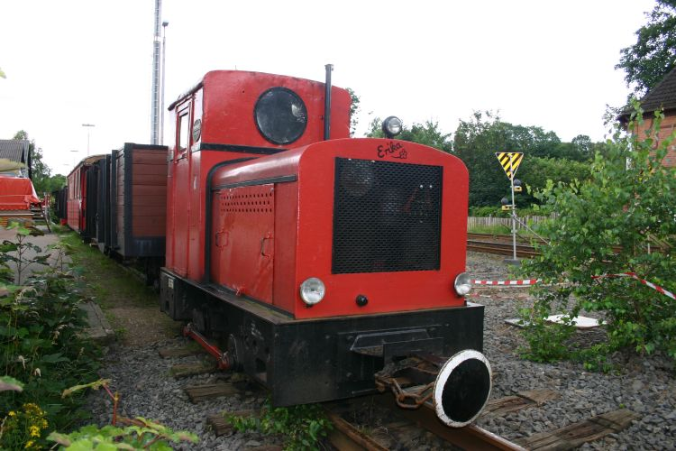 Malente-Gremsmühlen - Deutz 16373